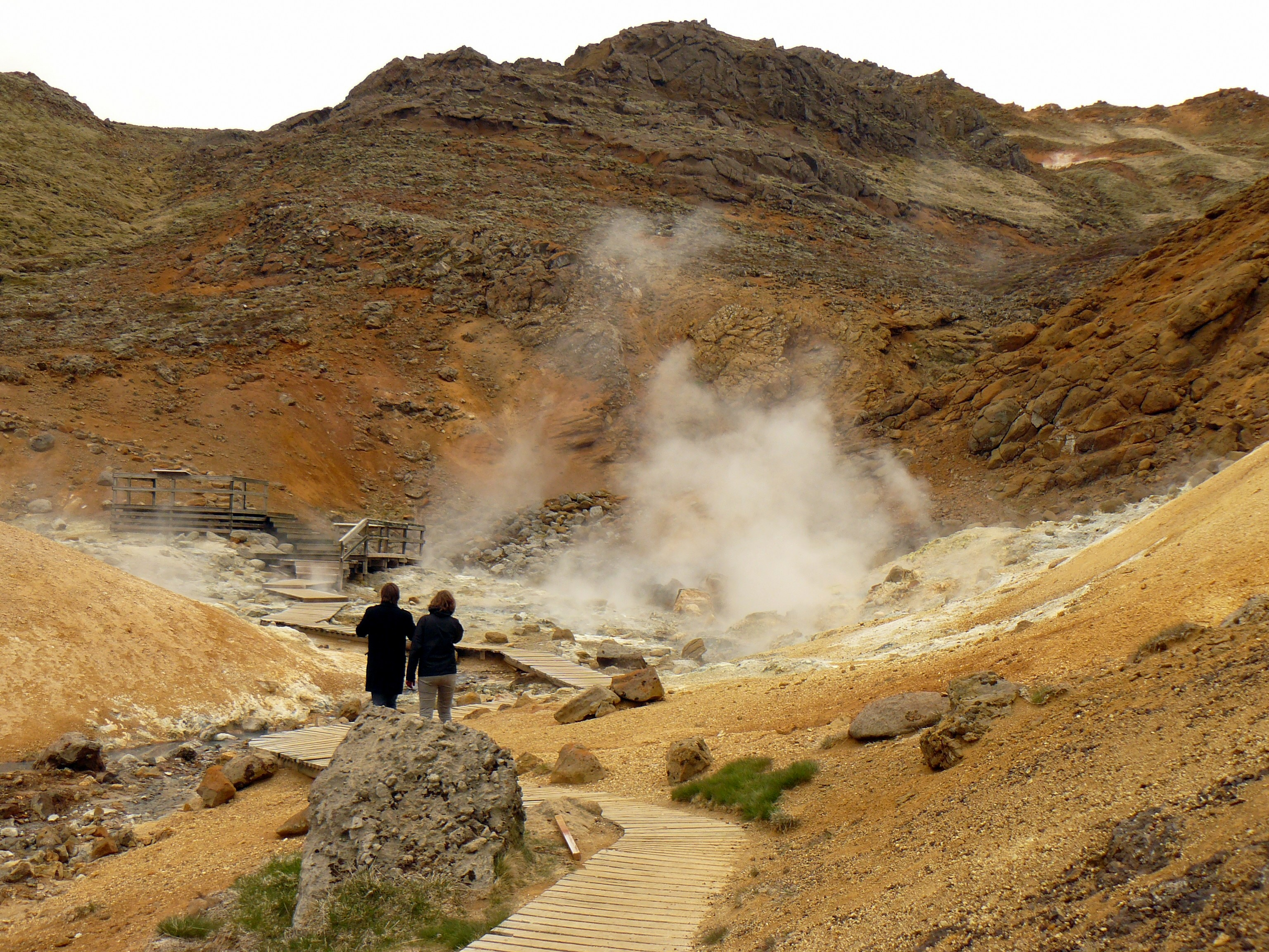 Le site de Seltún, près de Krýsuvík (Islande)